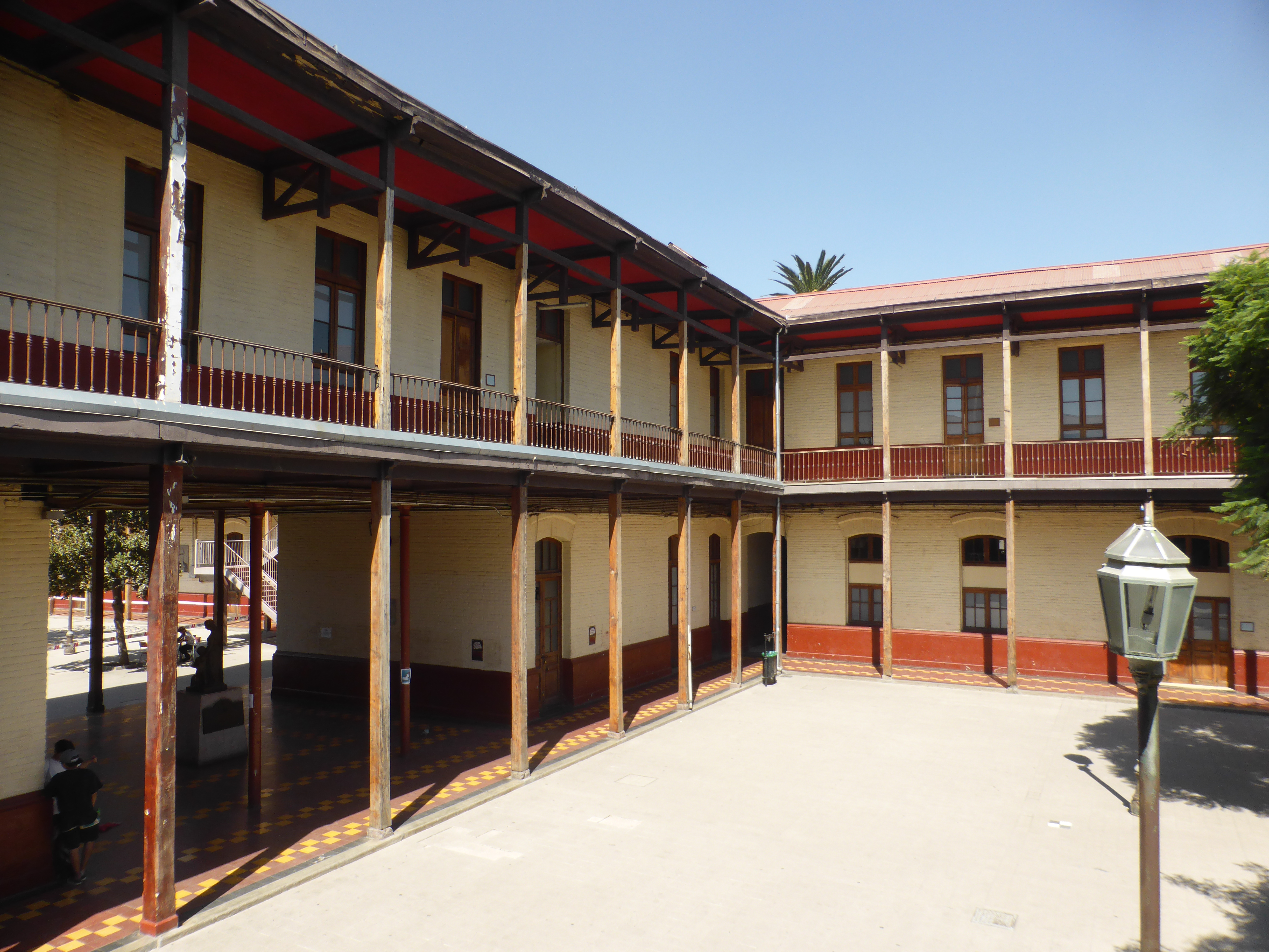 Algunos edificios de la actual "Universidad de Santiago de Chile" fueron de la antigua Escuela de Artes y Oficios (EAO) creada en el siglo XIX.